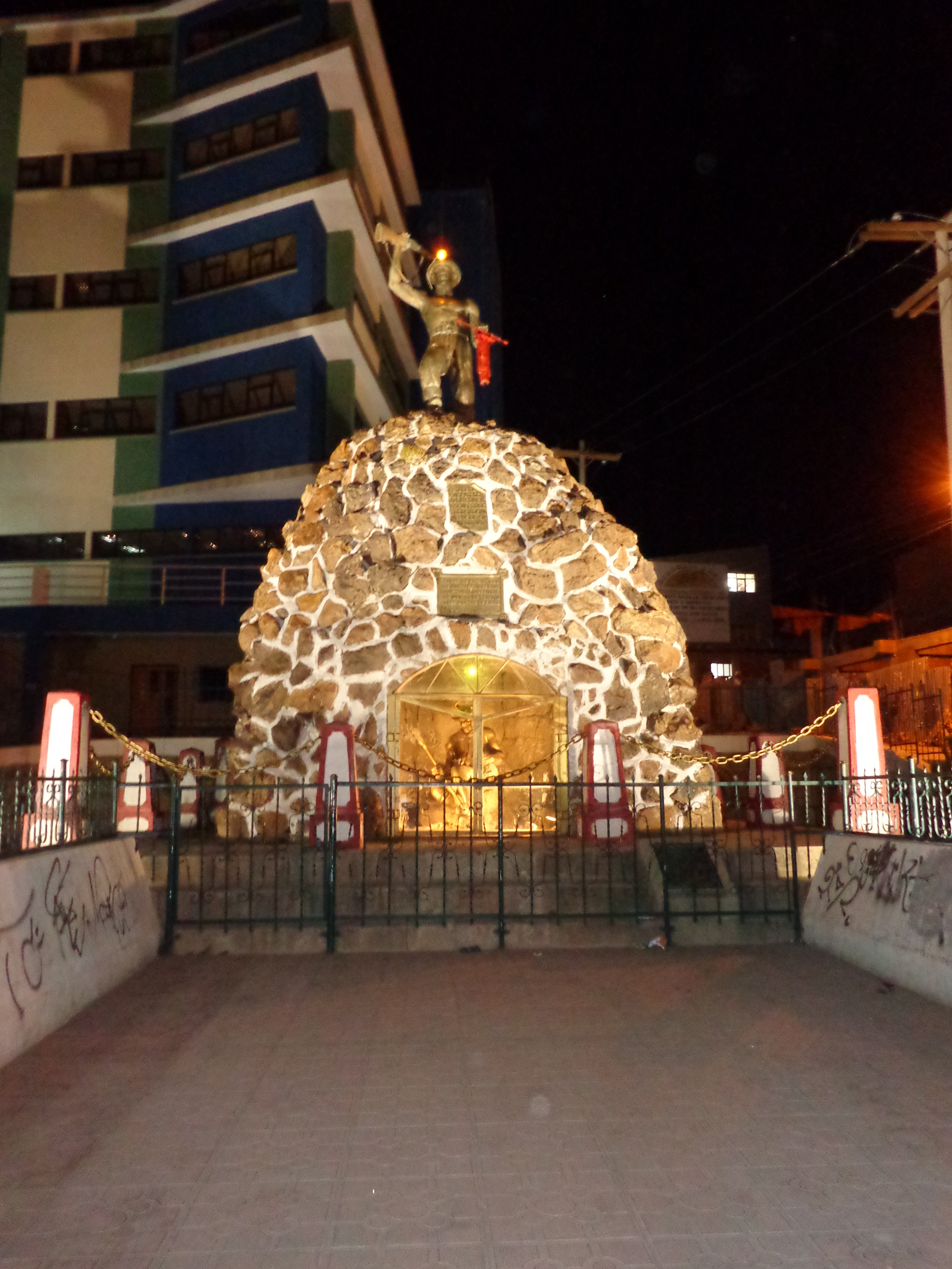 fotografia plaza del minero llallagua siglo xx